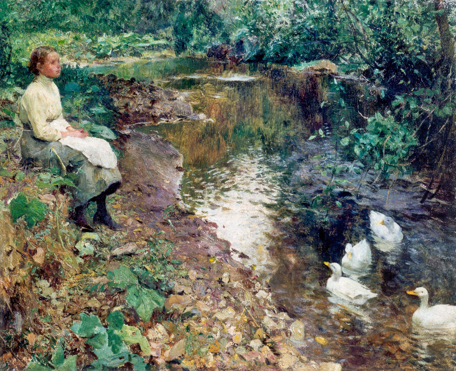 Jeune fille au bord du ruisseau